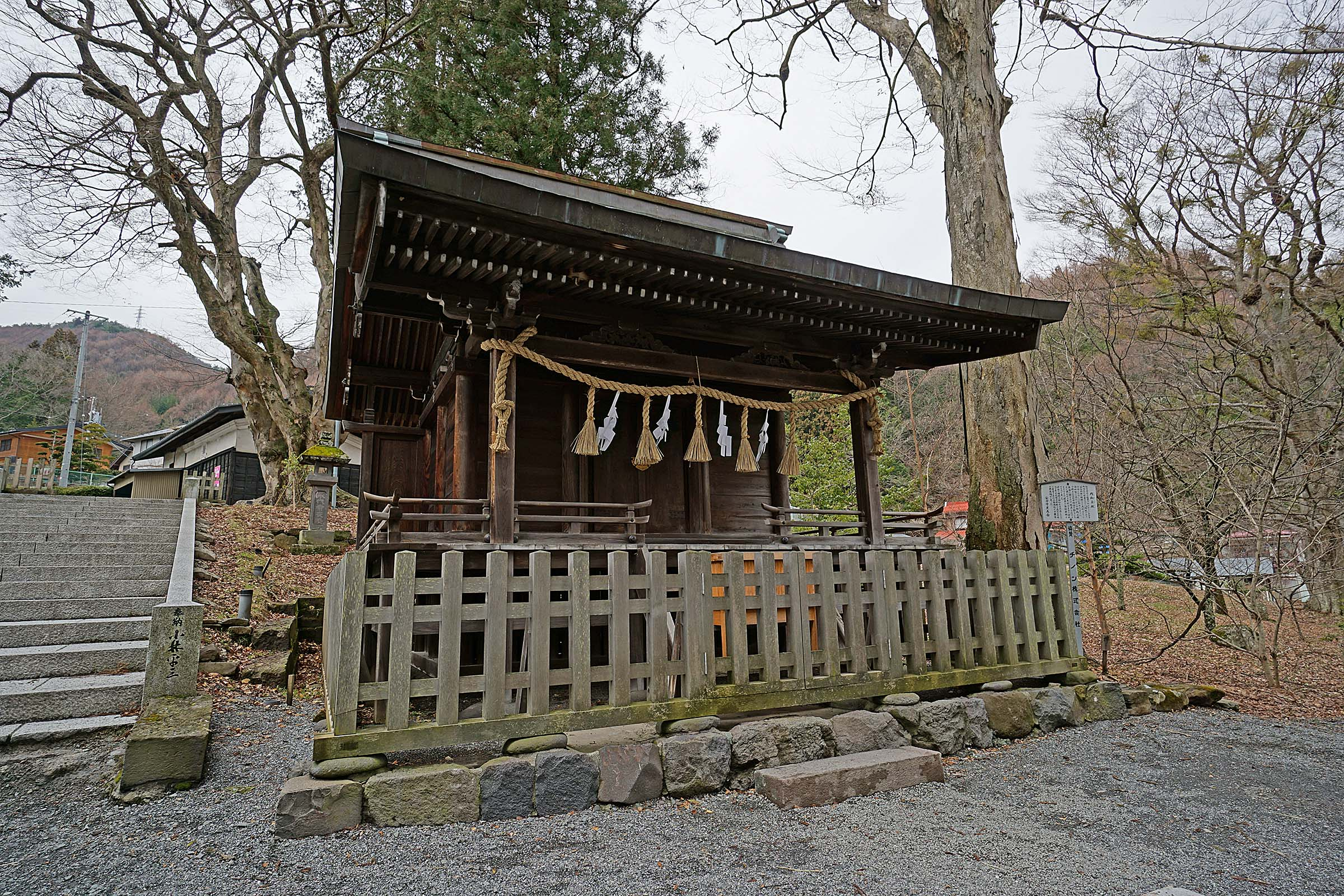 Suwa taisha Kamisha Maemiya , 諏訪大社 上社 前宮 内御玉殿